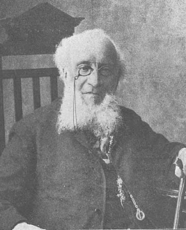 Семёнов-Тян-Шанский, Пётр Петрович